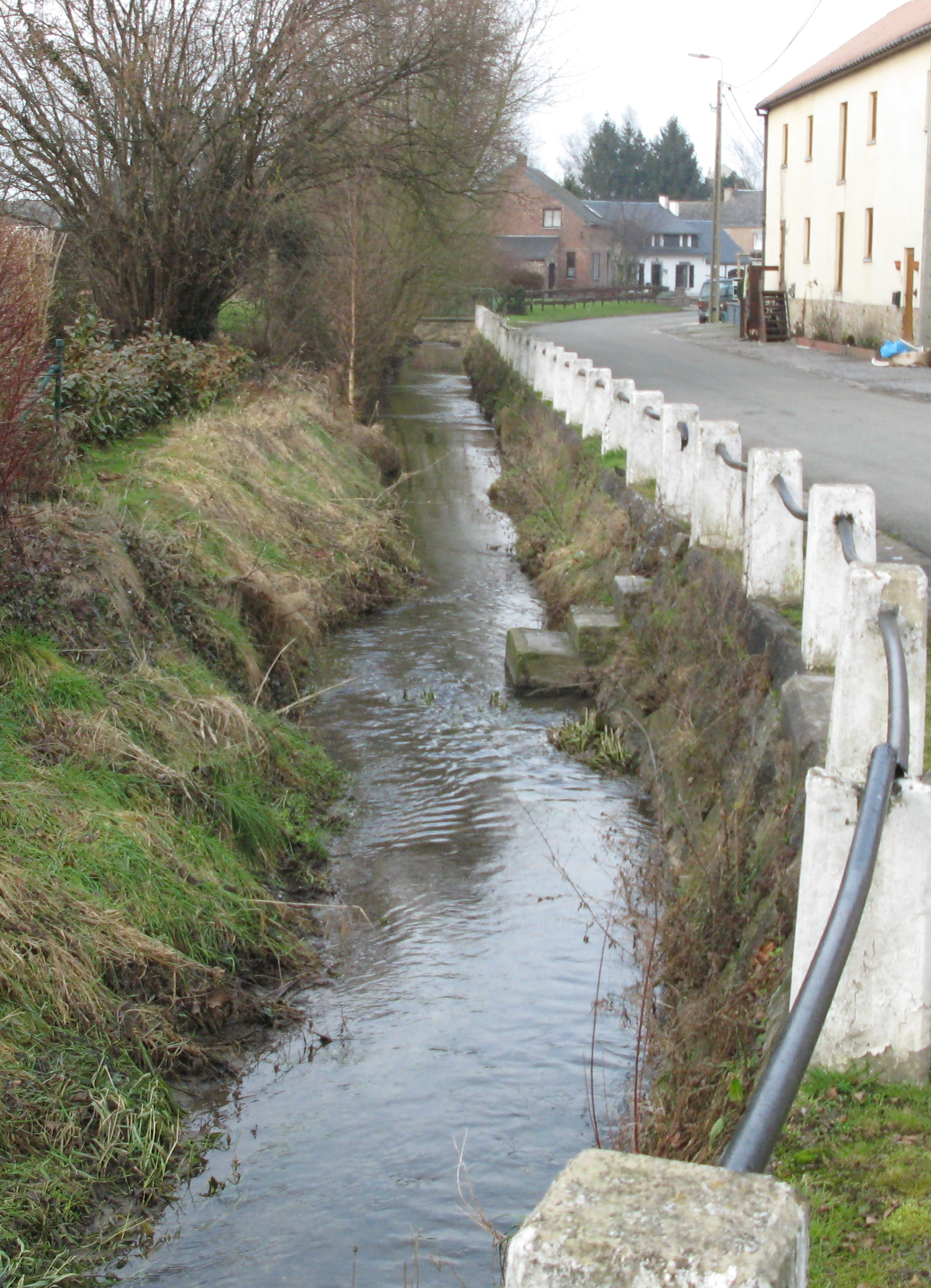 D'Rée an der Uertschaft Meeffe. Kategorie:Baachen an der Provënz Léck